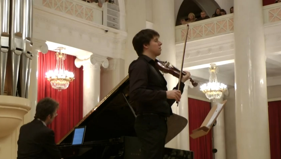 Фото с концерта в БЗФ Санкт-Петербурга.